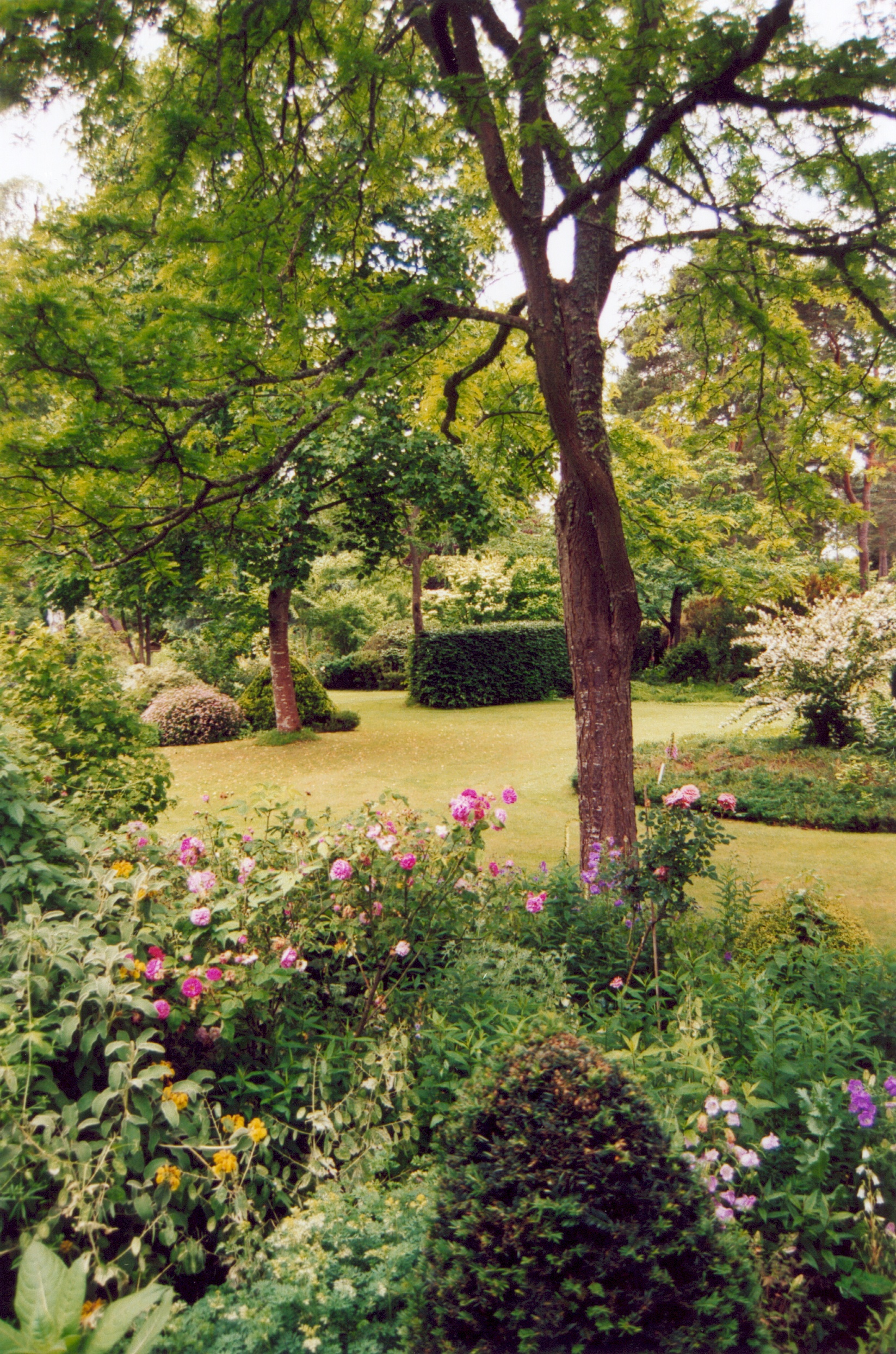 France Loiret Ingrannes Arboretum des Grandes Bruyères Photographie prise par GIRAUD Patrick